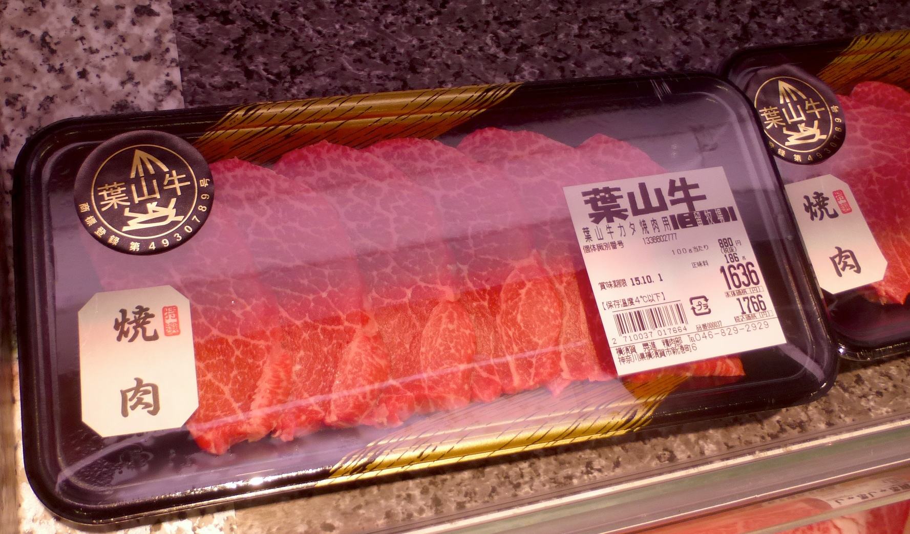 葉山牛 (Hayama beef)